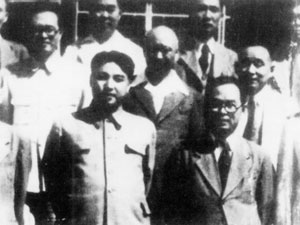 Kim Il-sung and Park Hon-yong, Baik Nam-un